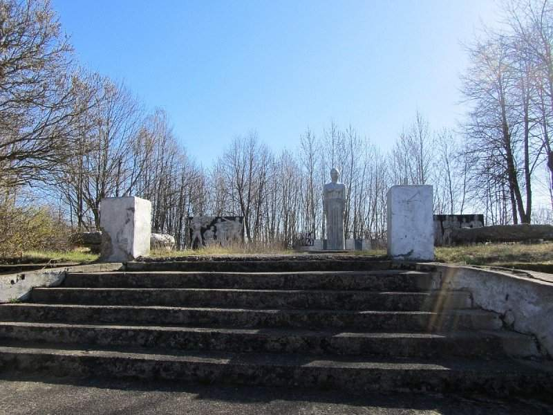 Залужжа (Стаўбцоўскі раён). Рэшткі царкоўнай агароджы